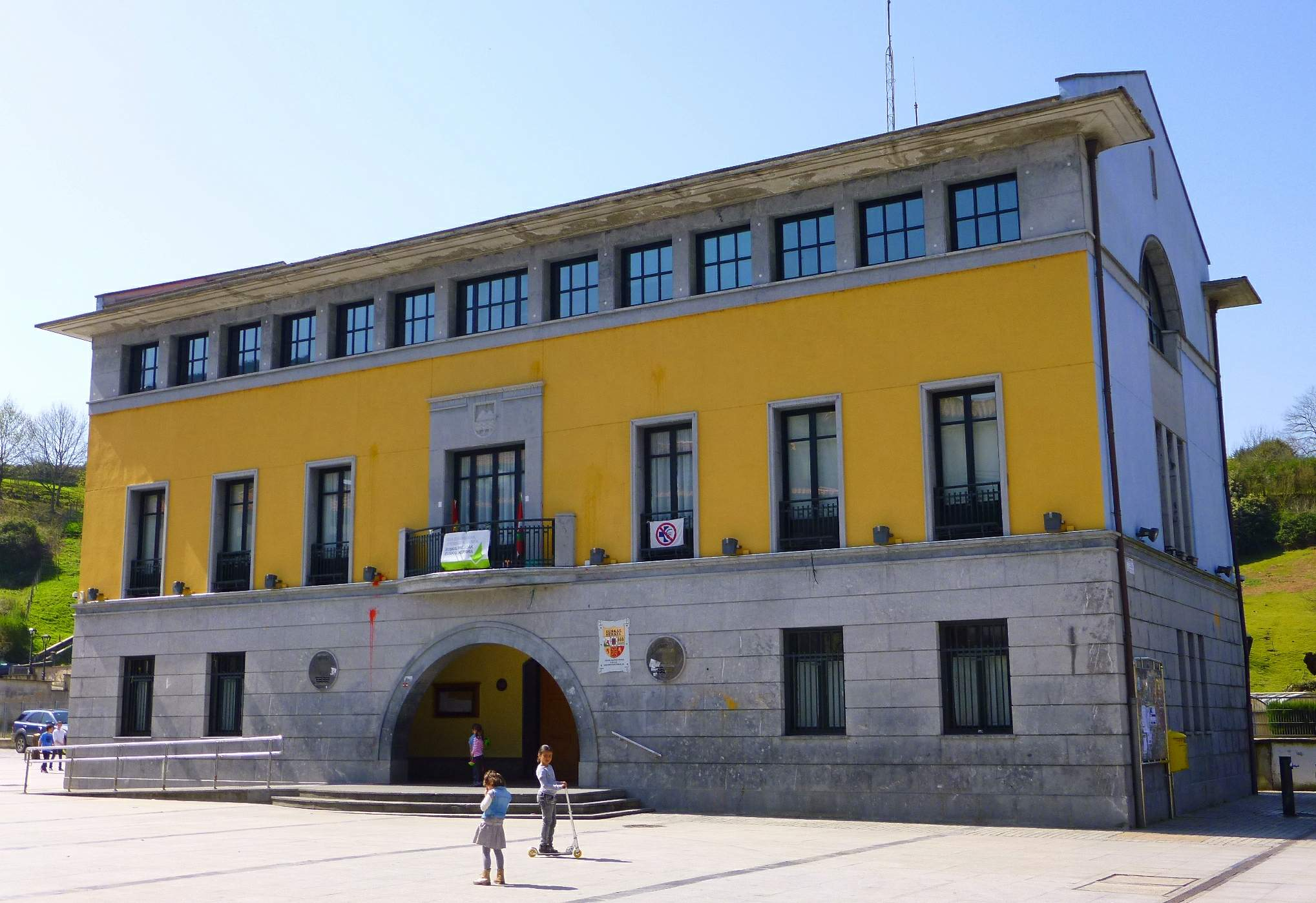 Ayuntamiento de Ibarra (Gipuzkoa)